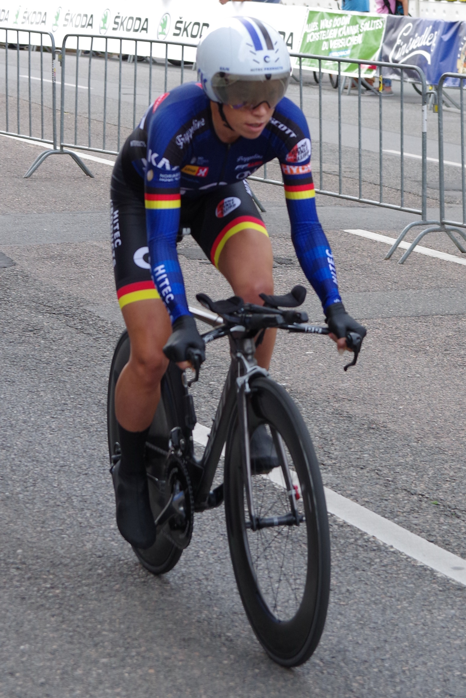 Deutsche Meisterschaften im Einzelzeitfahren 2017 23. Juni 2017 The making of this document was supported by the Community-Budget of Wikimedia Germany.